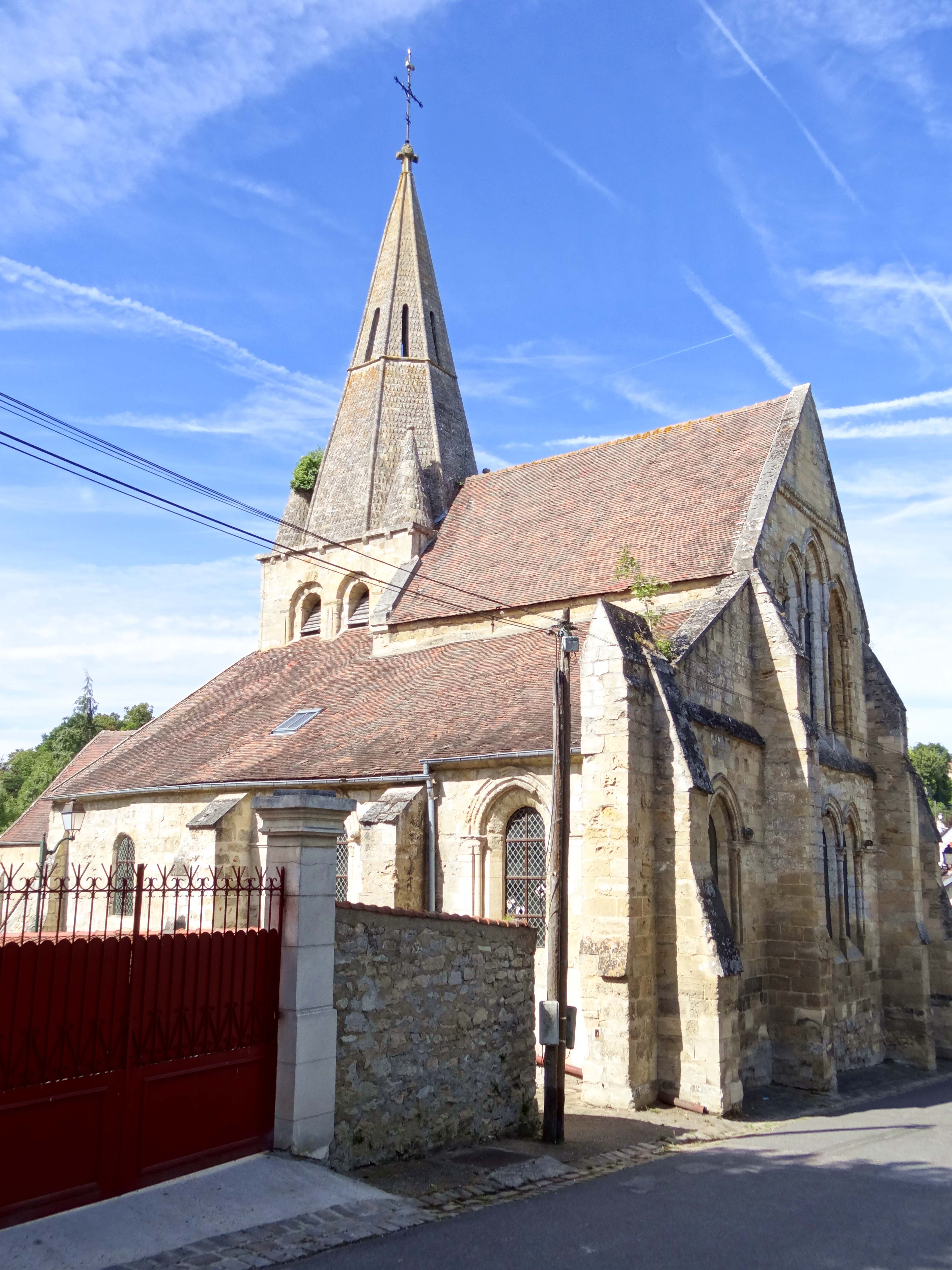 Église Notre-Dame-de-l'Assomption de Gaillon-sur-Montcient - voir titre.